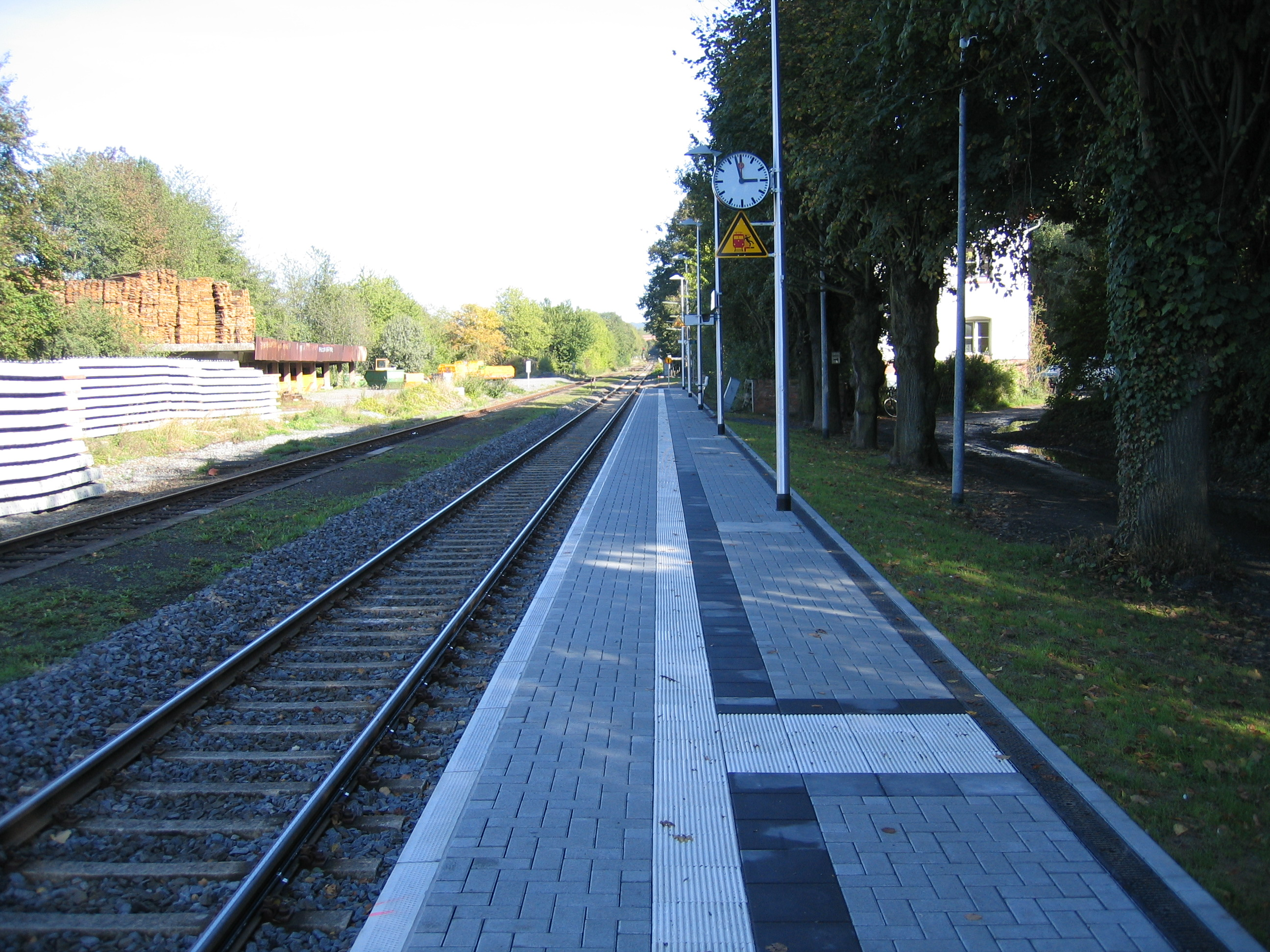 Haltepunkt Otzberg-Lengfeld